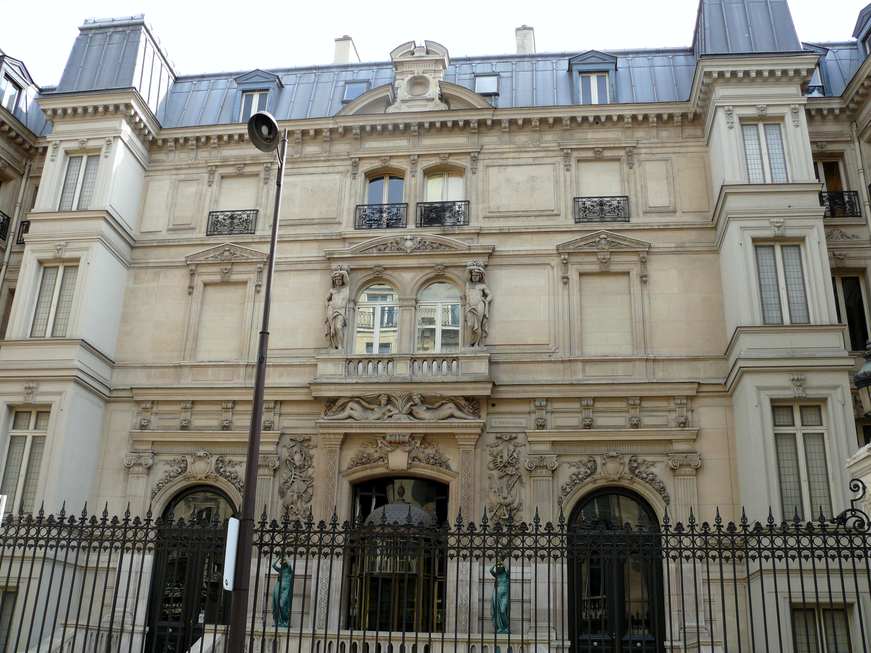 7 rue de Tilsitt - Hôtel de Gunsburg